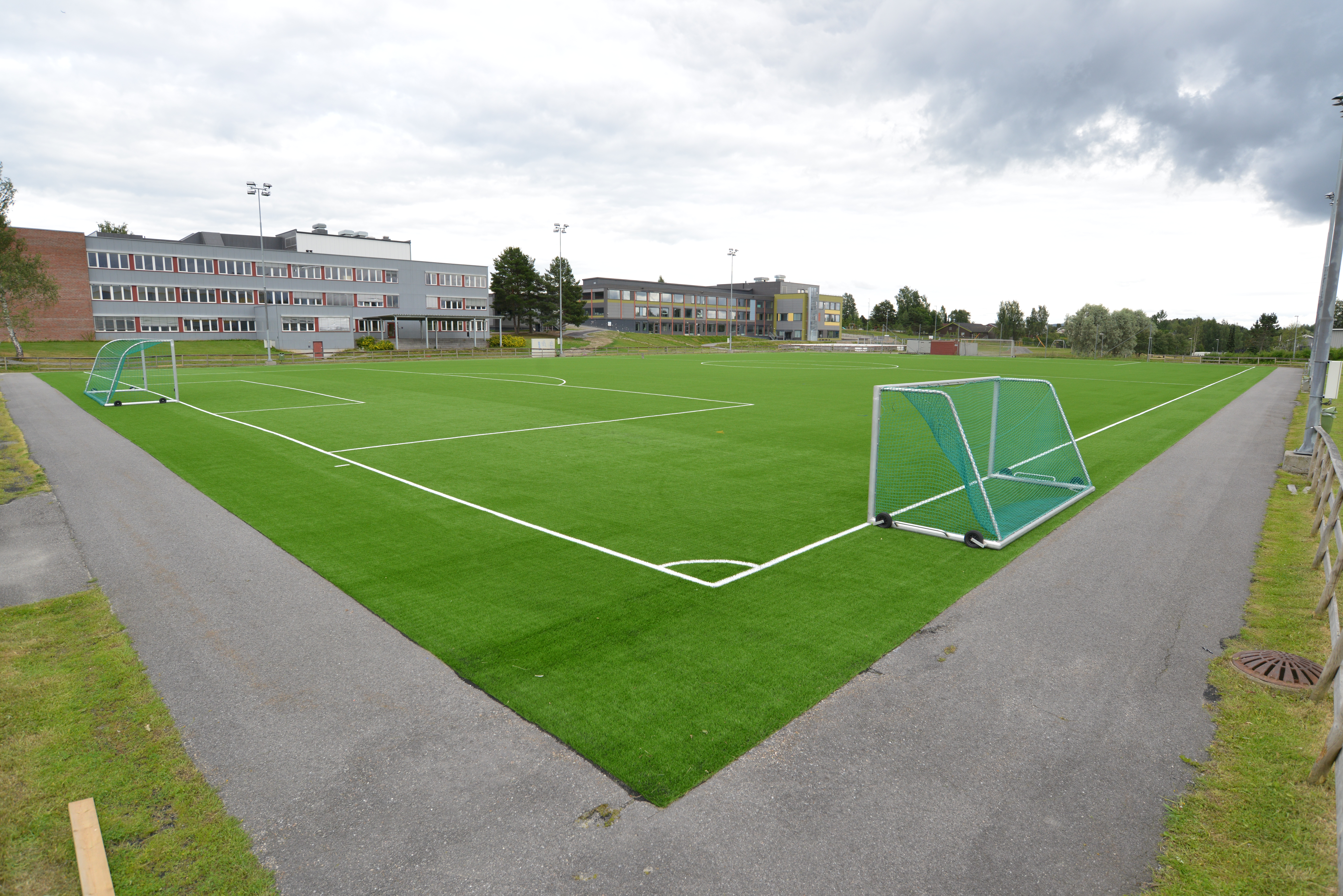 Kløfta stadion ved Bakke og Vesong skoler